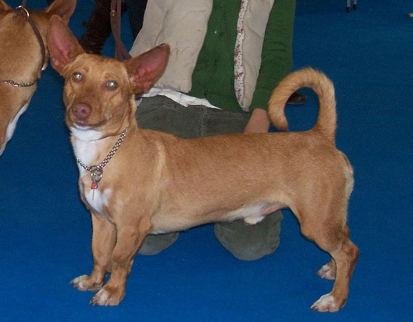 Maneto en la exposición de Jerez de la Ftra.